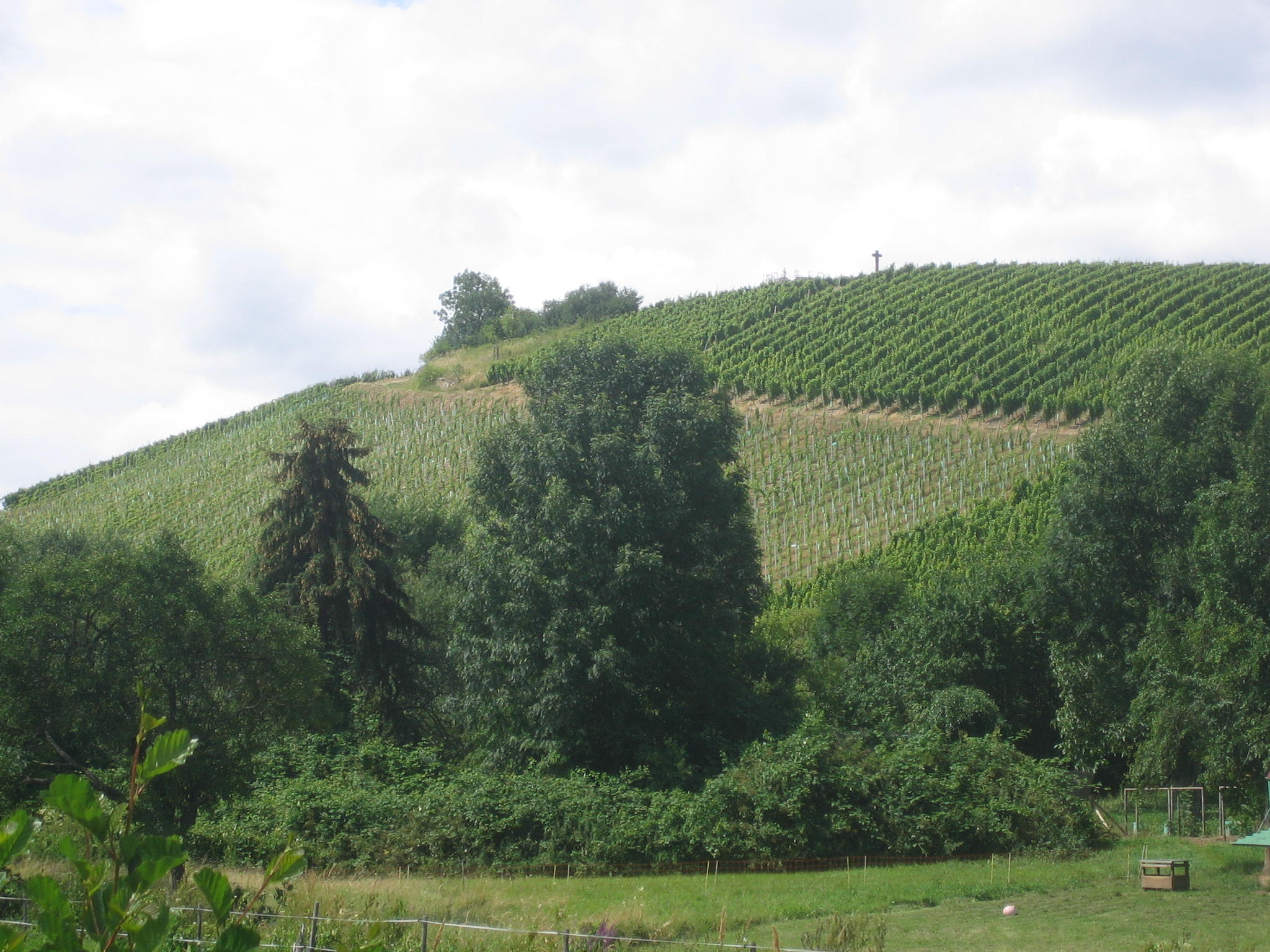 Kiedricher Gräfenberg, östlich der Gemeinde Kiedrich